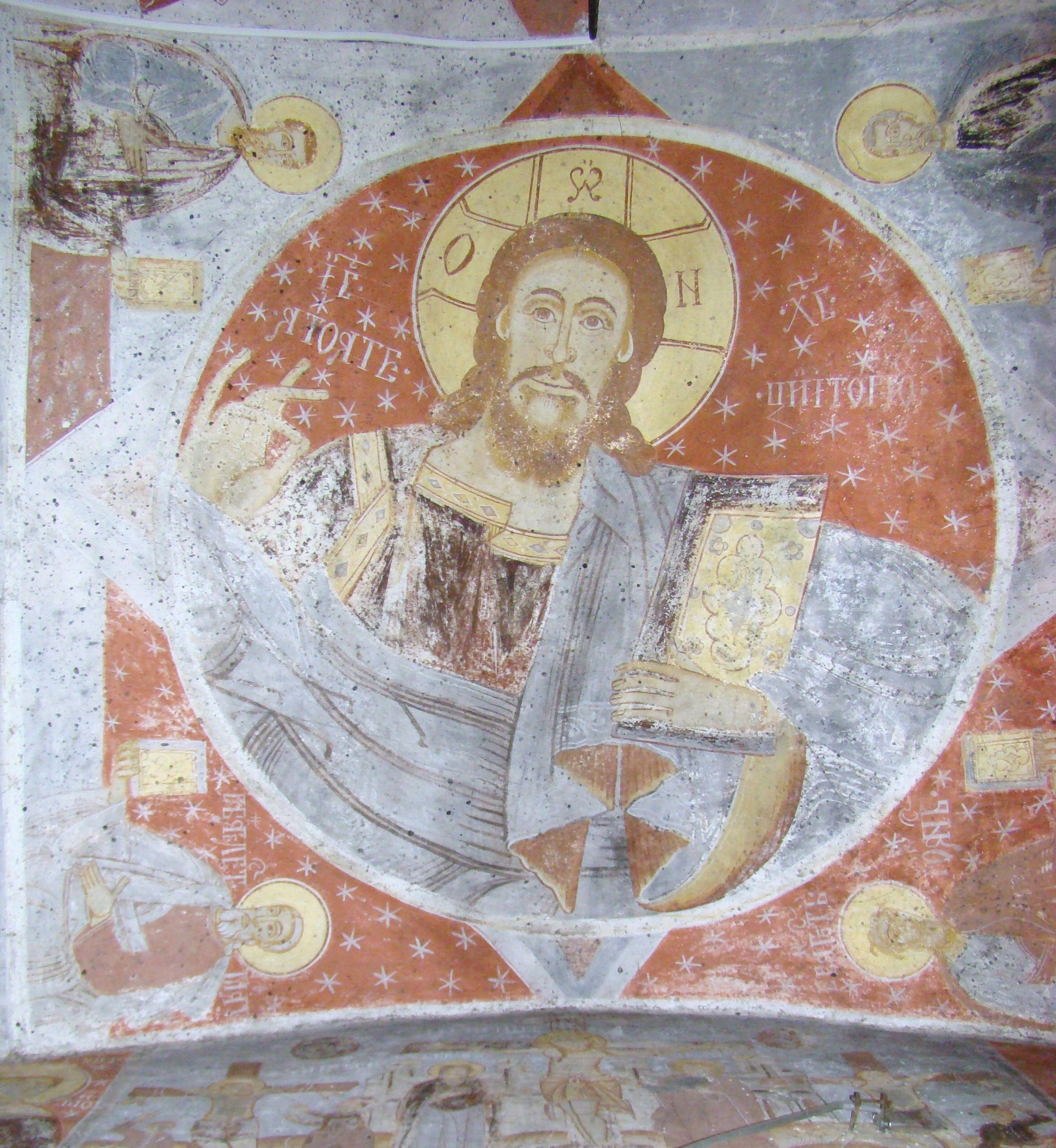 Biserica "Înălţarea Domnului" , sat NUCŞOARA; comuna SĂLAŞU DE SUS